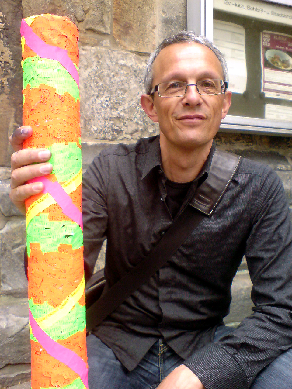 Jürgen Rink, c't magazin für computer technik, Chefredakteur im Heise Zeitschriften-Verlag für c't Digitale Fotografie, heise Foto und Sonderhefte, Teilnehmer der "Schwarmkunstaktion" Strich-Code zur Hinterfragung von käuflicher Sexualität und käuflicher Kunst ...